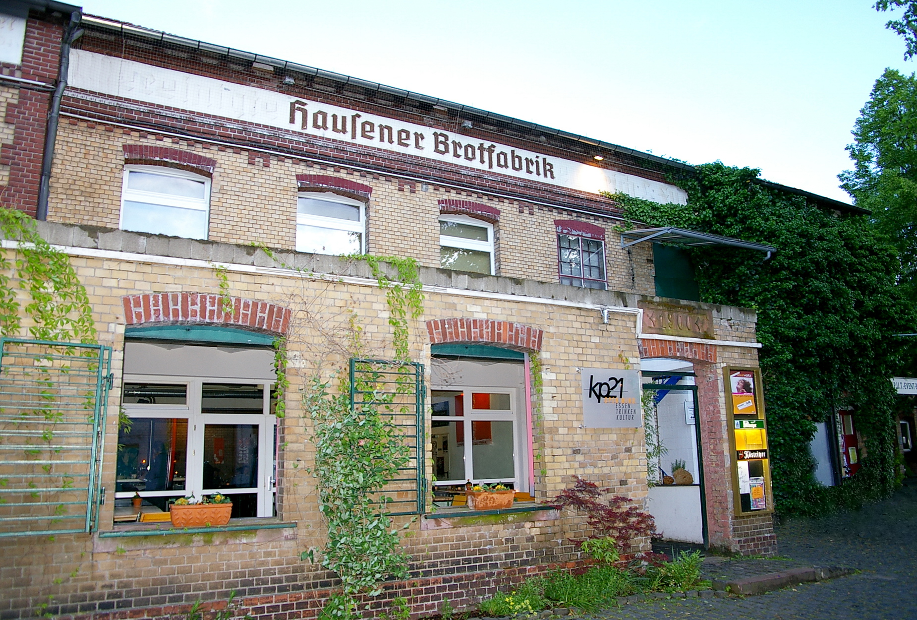 "Brotfabrik" in Frankfurt/Main, Germany